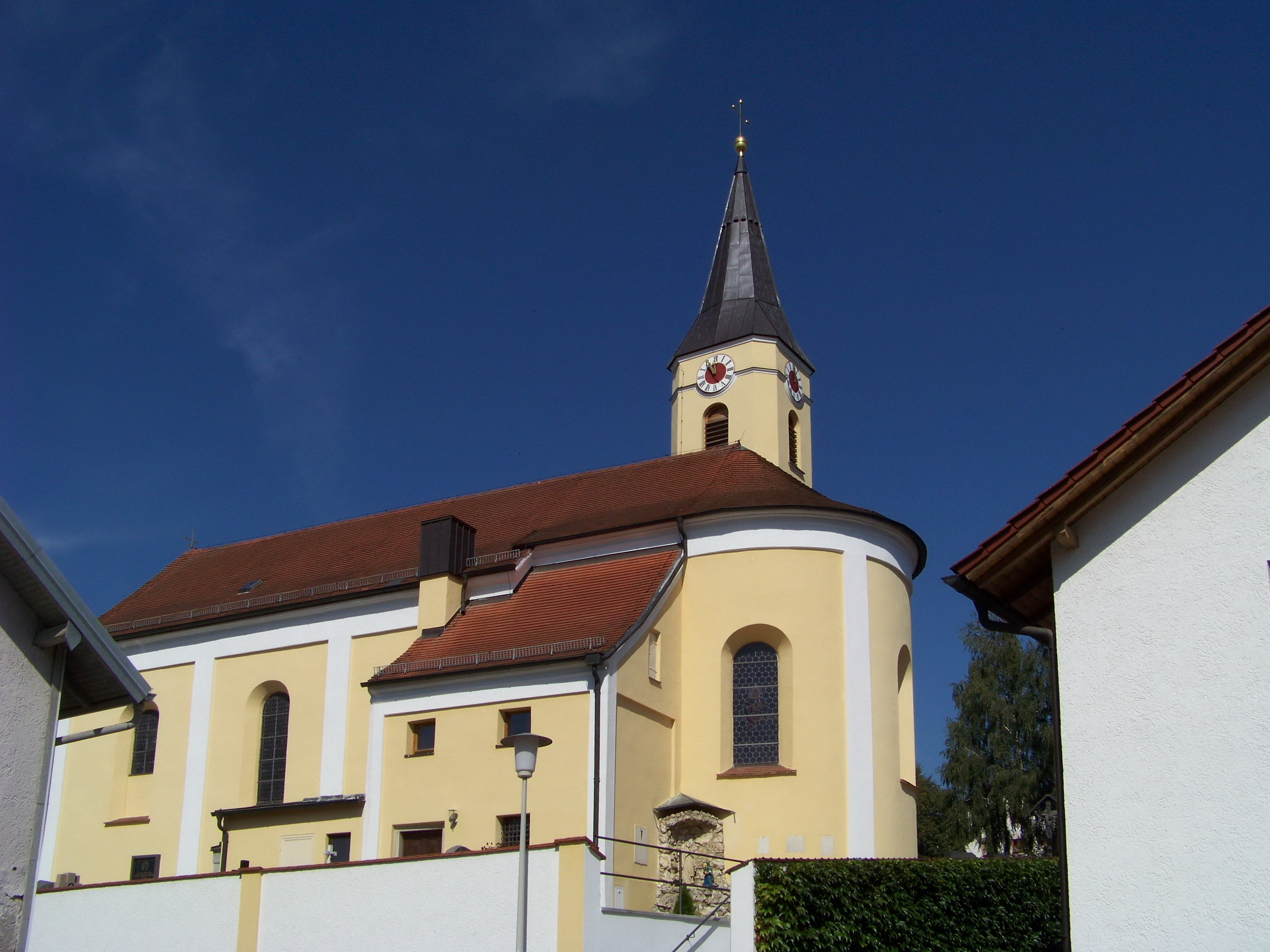 Hankofen, St.-Georg-Ring 3. Kath. Filialkirche St. Georg, einheitlicher Bau, 1799; mit Ausstattung.